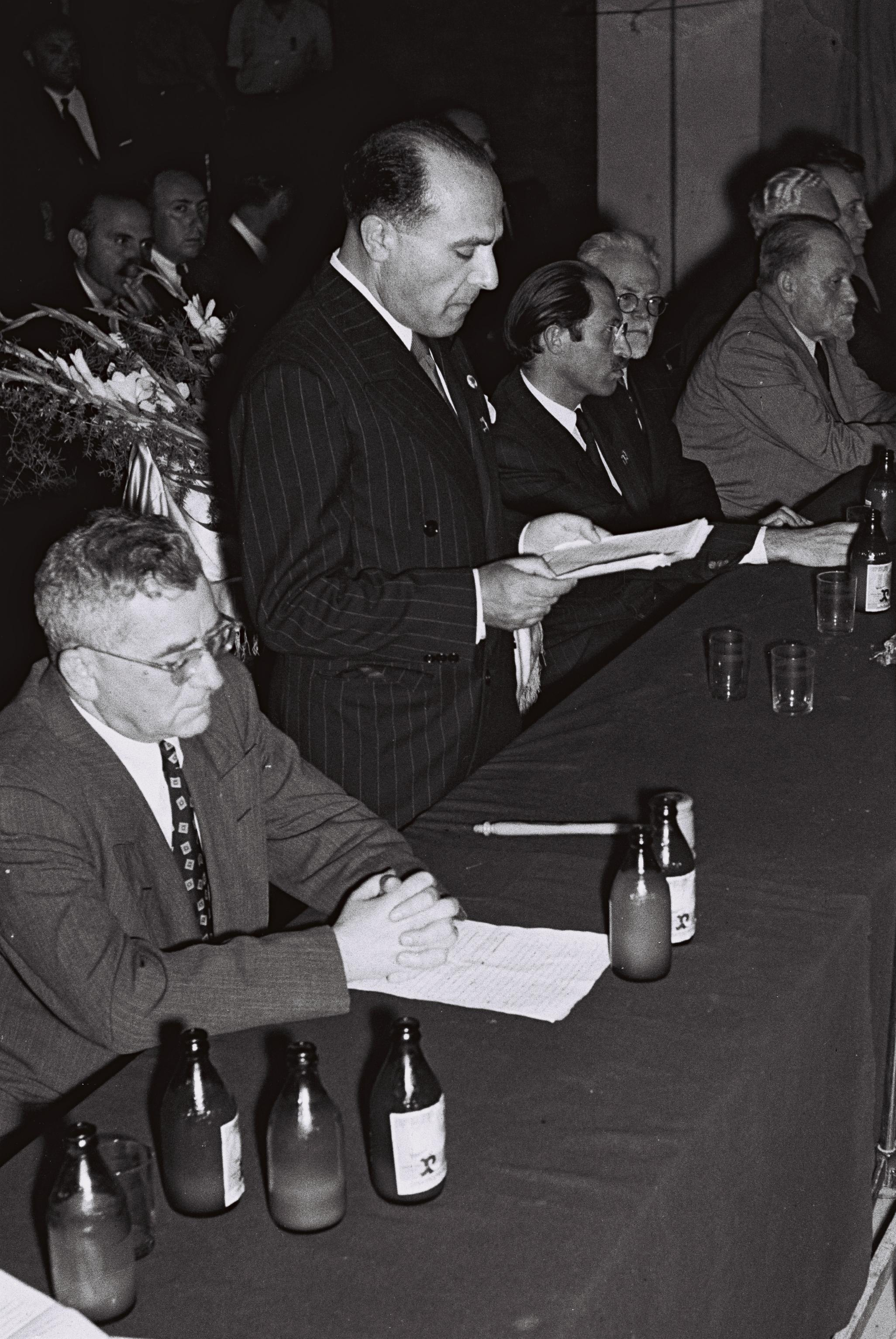 אהרון צבי פרופס נואם בכנס ברית הציונים הרוויזיוניסטים באולם אוהל שם בתל אביב, לימינו מאיר גרוסמן ולשמאלו מנחם בגין.